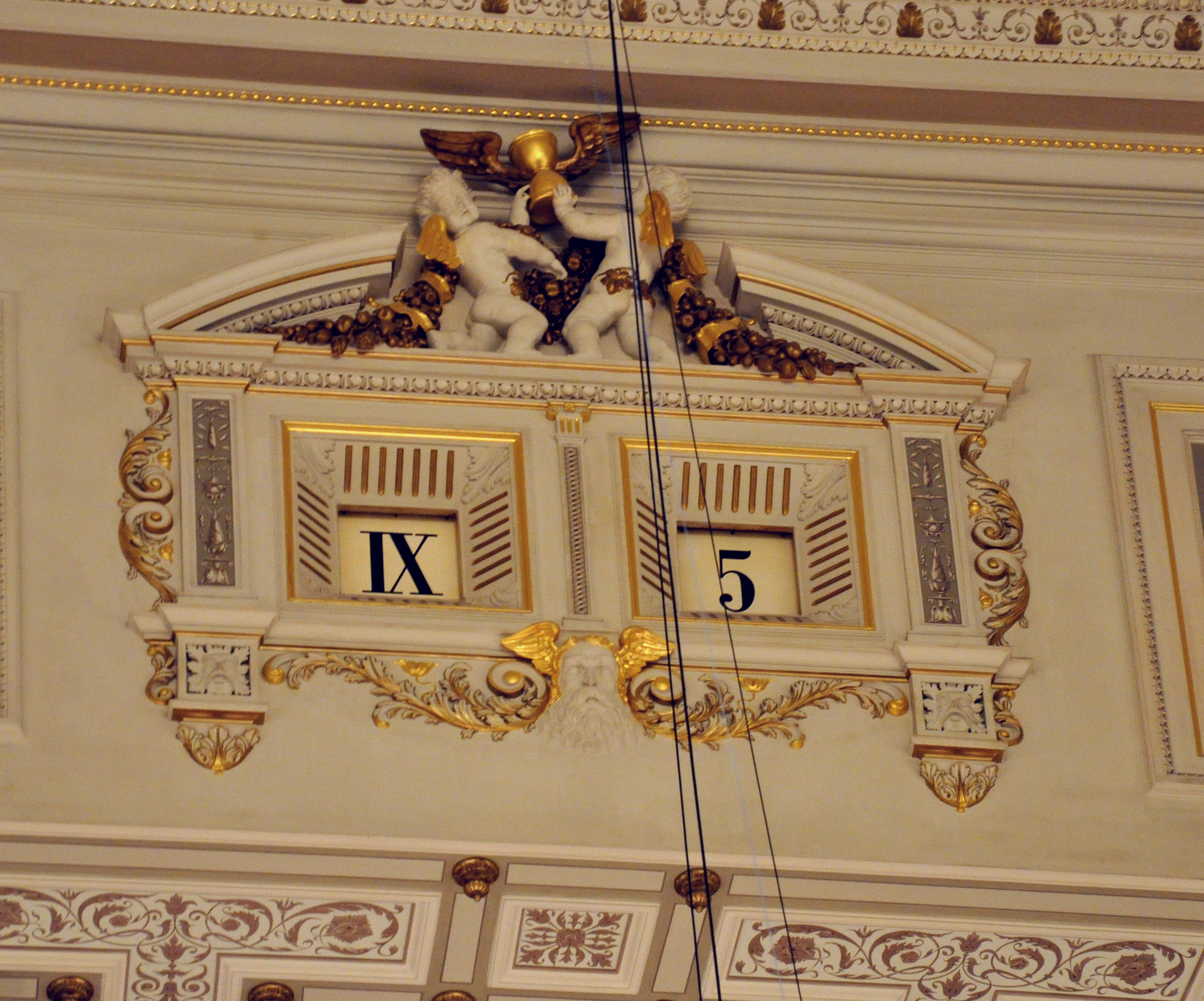 Dresden, Semperoper, mechanische Fünf-Minuten-Digitaluhr im Zuschauerraum (über der Bühne)